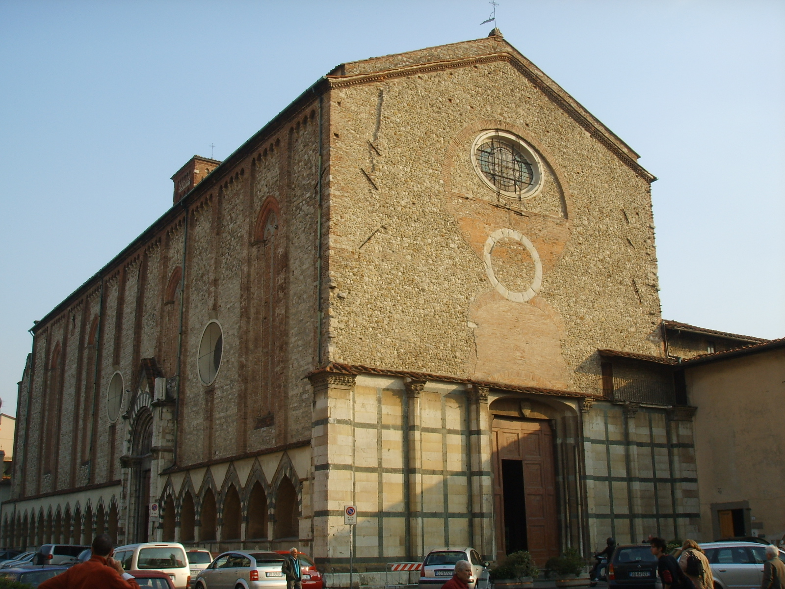 Chiesa_di_San_Domenico